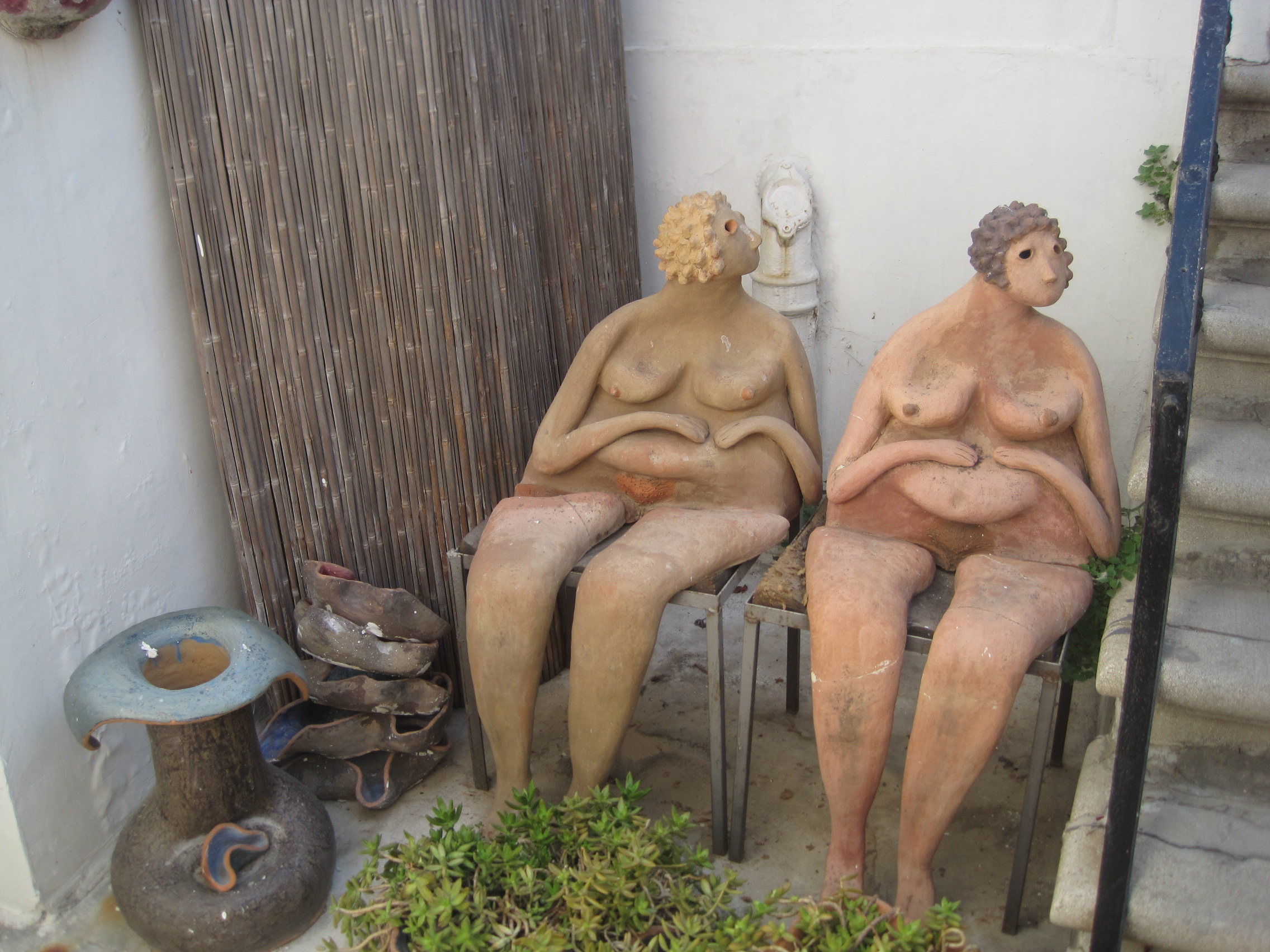 בית שמעון רוקח (בית הש"ר) ברח' רוקח בתל אביב